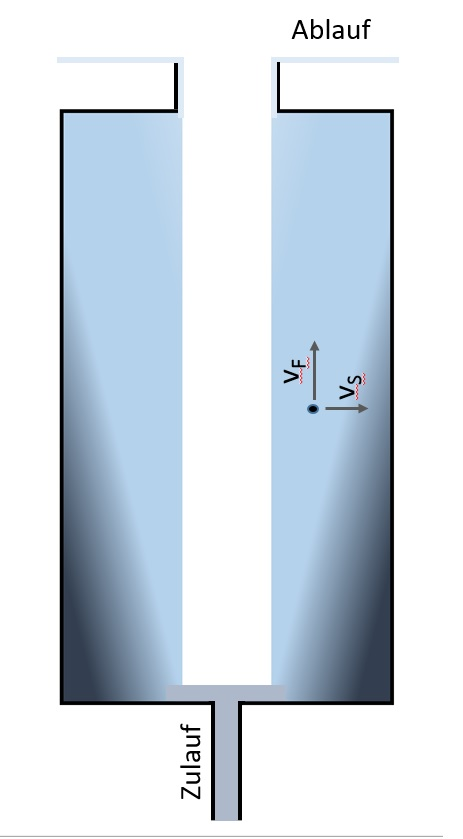 Funktionsprinzip der Röhrenzentrifuge